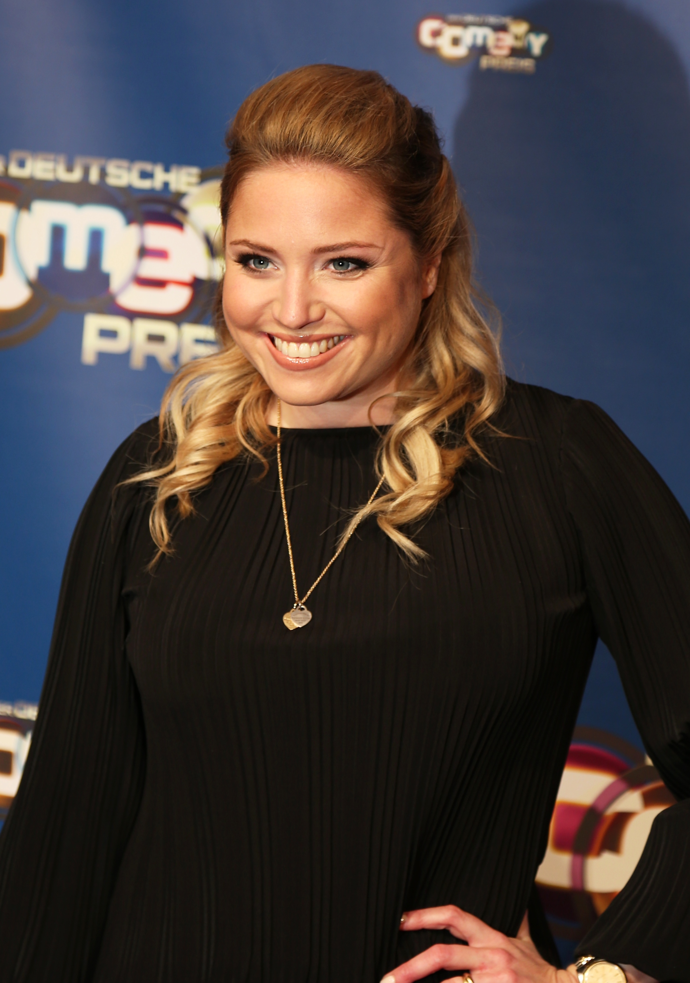 Caroline Frier beim Deutschen Comedypreis 2017.